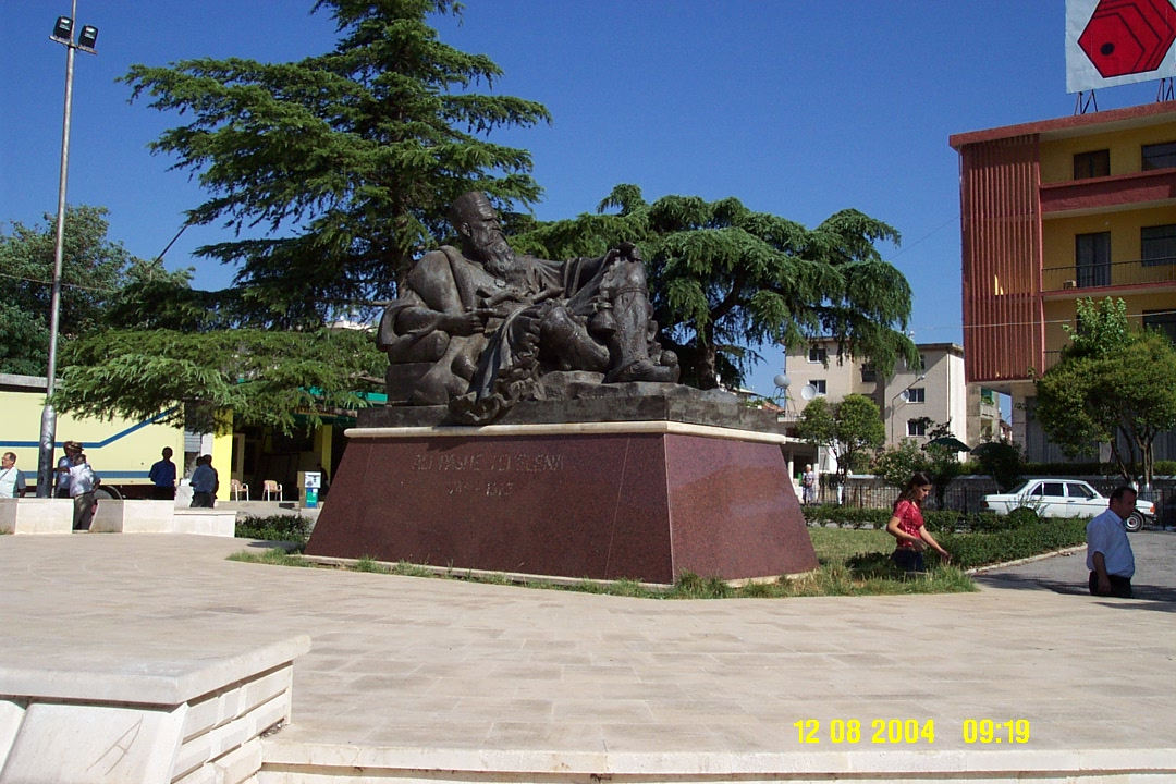 Náměstí v Tëpelenë